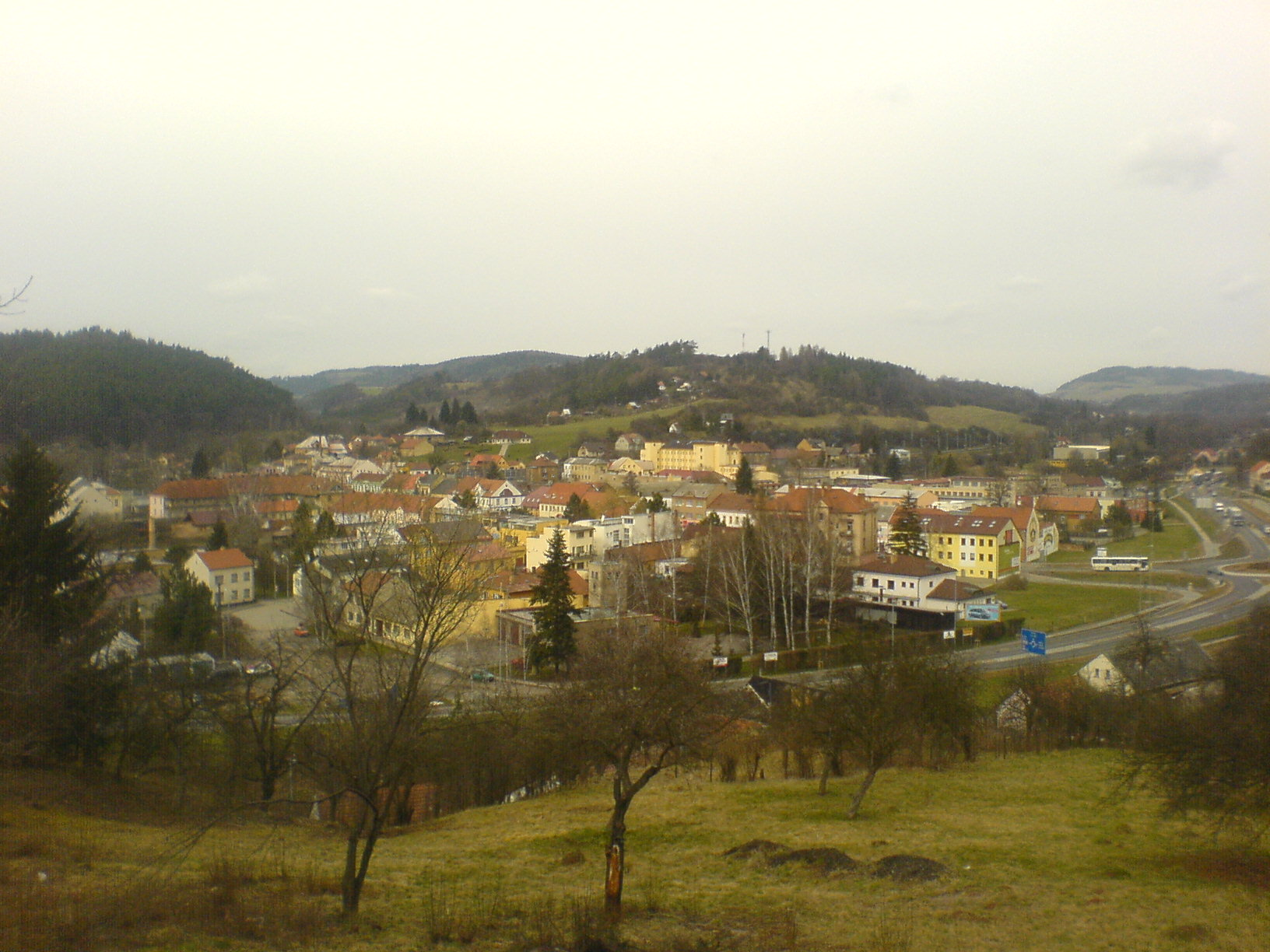 město Letovice